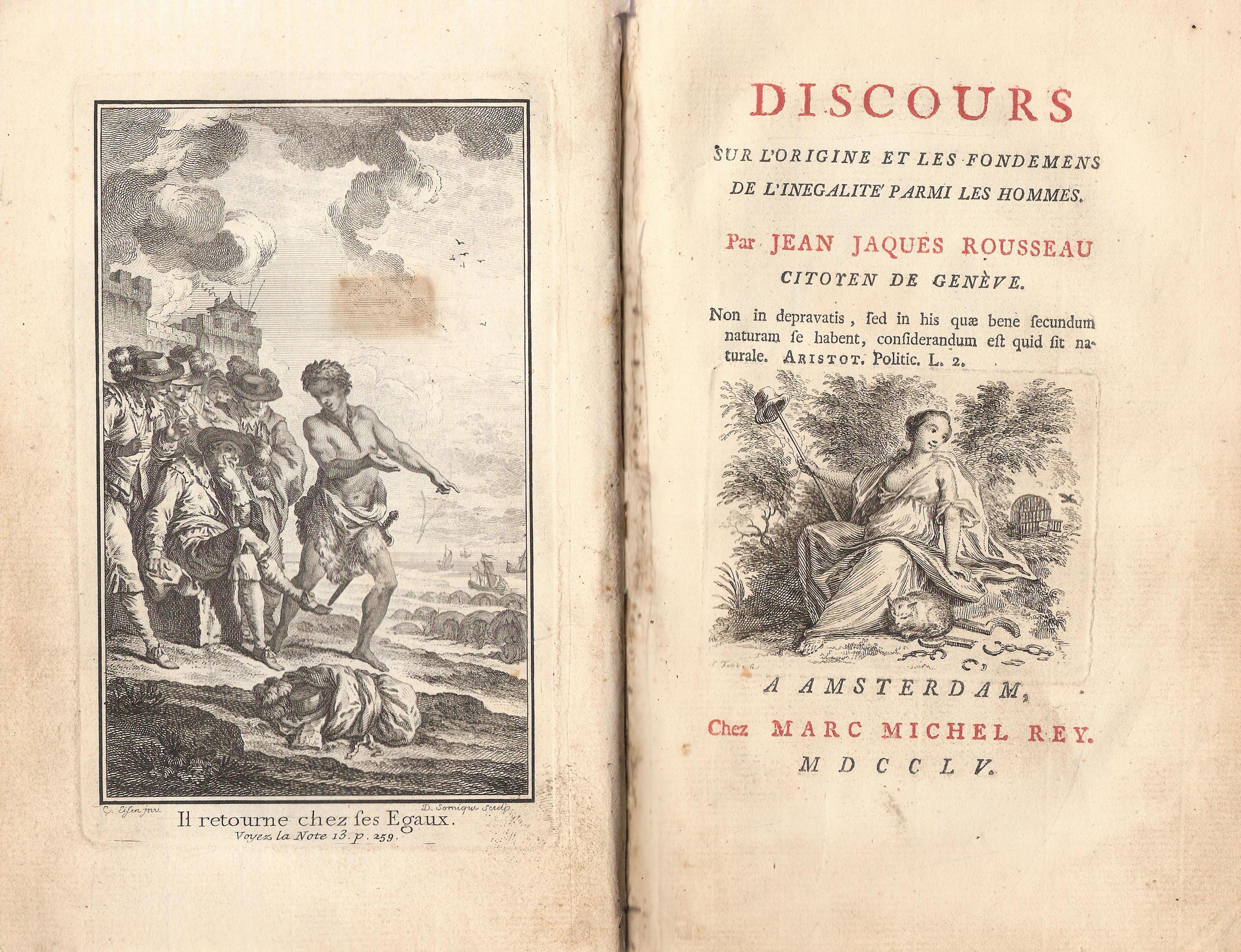 discours sur l'origine et les fondements de l'inégalité parmi les hommes par Jean-Jacques Rousseau